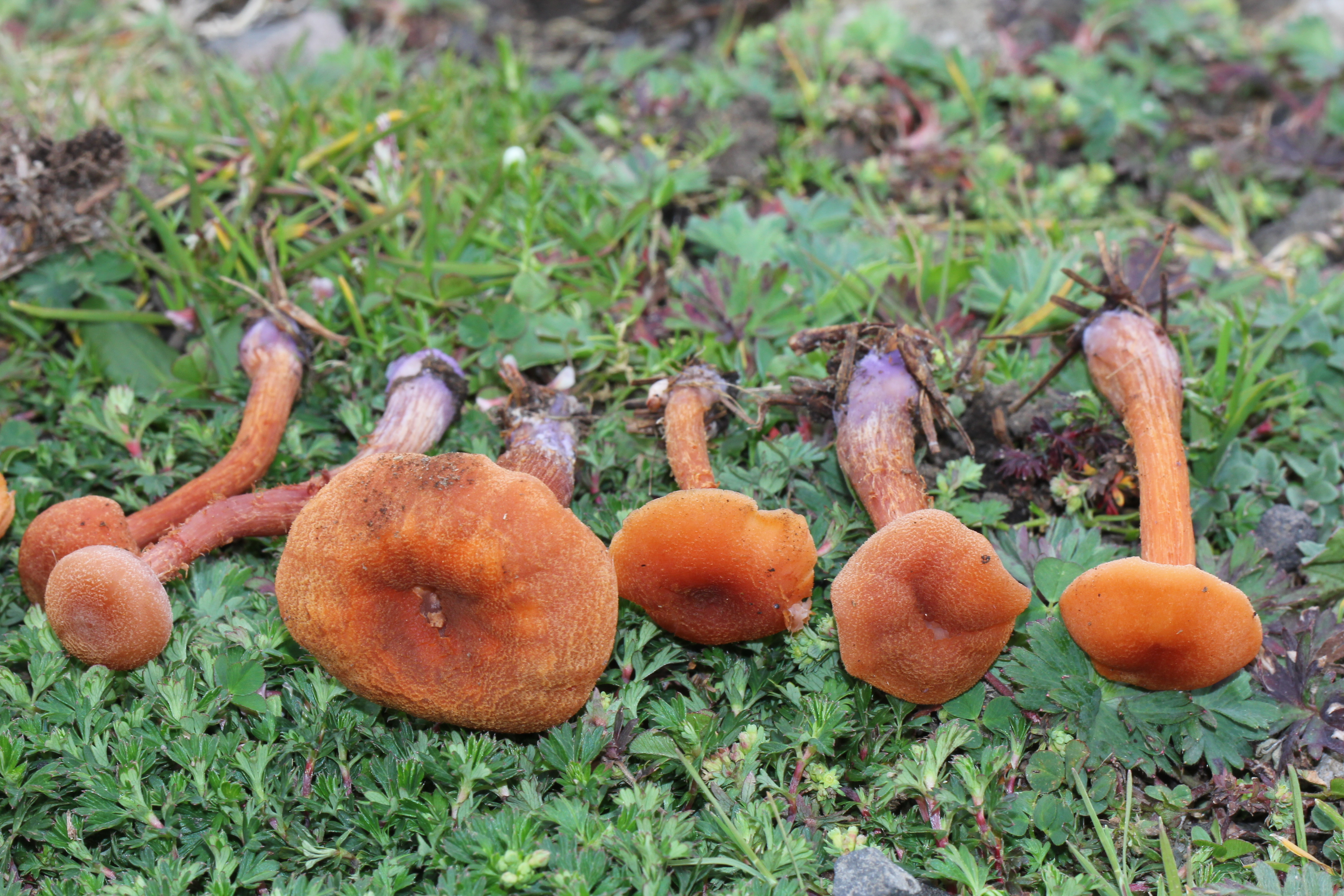 Laccaria bicolor (Maire) P.D. Orton